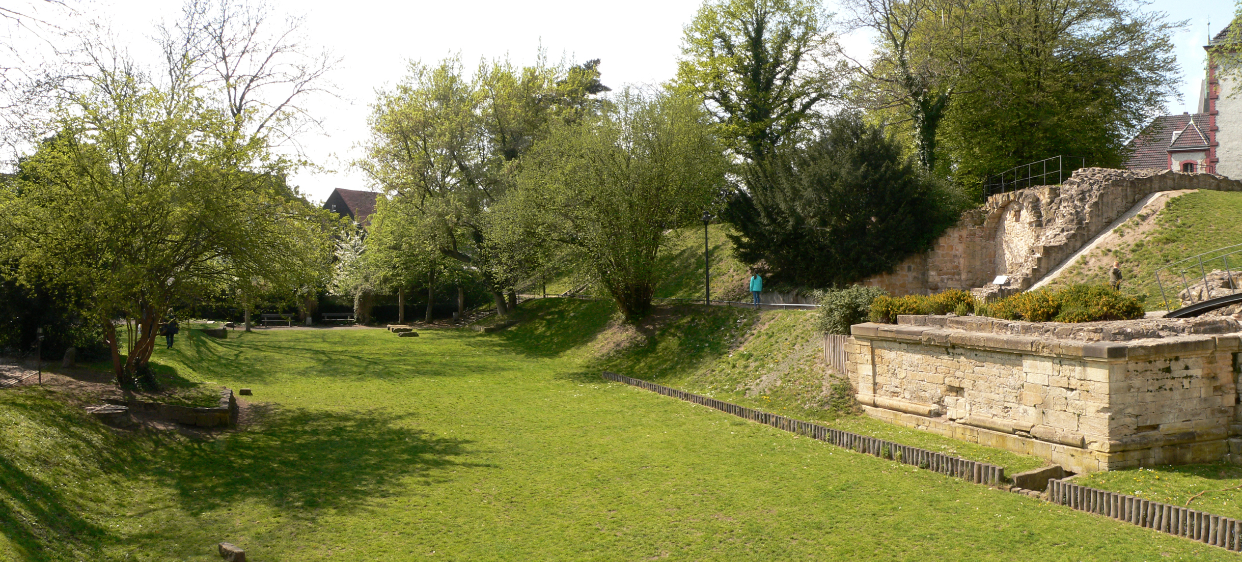 Früherer Wassergraben der Burg bzw. Festung Peine, rechts der Schlossberg mit Kasematte und Eskarpemauer